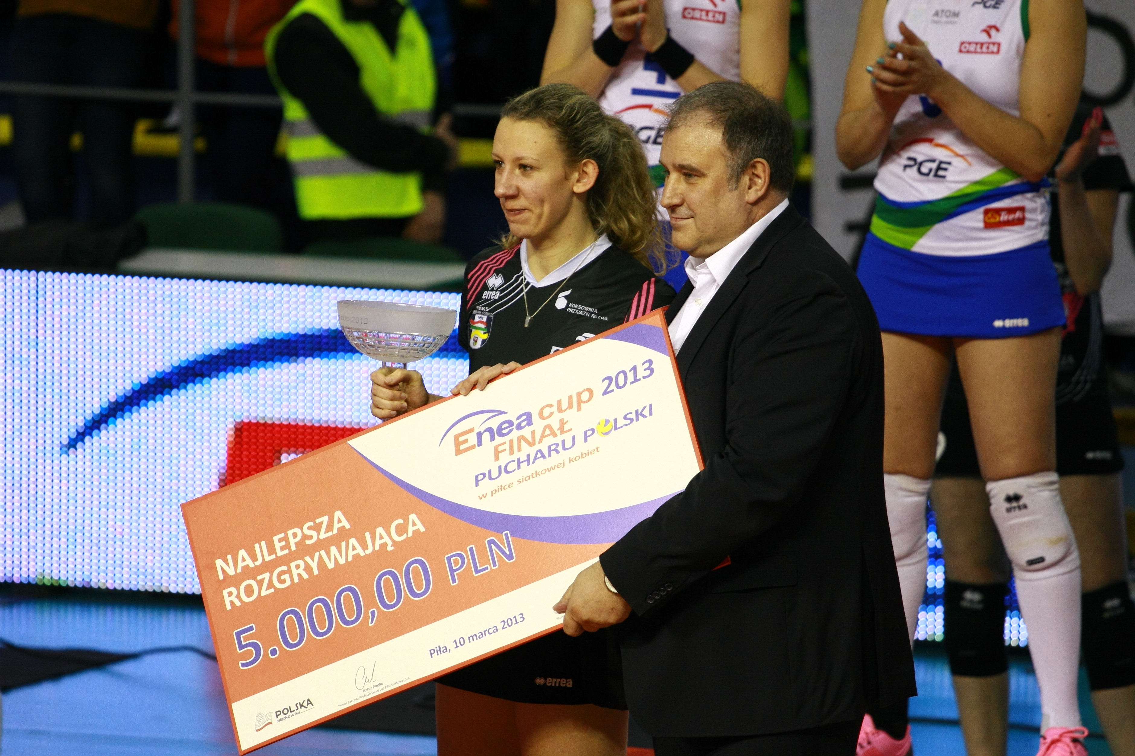 Atom Trefl Sopot Bank BPS Muszynianka Fakro Muszyna Tauron MKS Dąbrowa Górnicza Impel Gwardia Wrocław